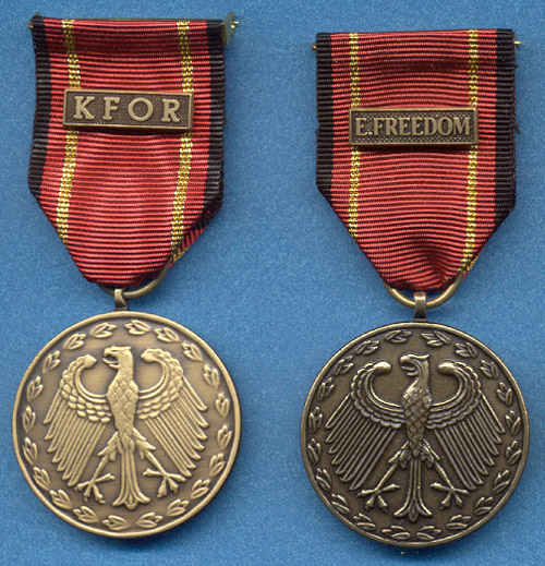 Scans von meiner Medaille-Sammlung. Selbst gescannt. Airbornelawyer 22:03, 23. Jul. 2007 (CEST)